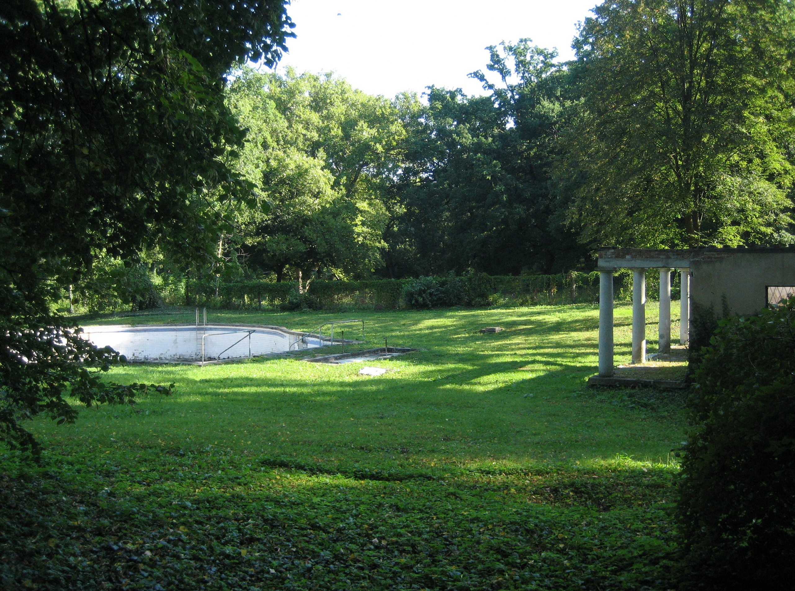 A füzérradványi Károlyi-kastély strandfürdője a parkban This is a photo of a monument in Hungary. Identifier: 2768